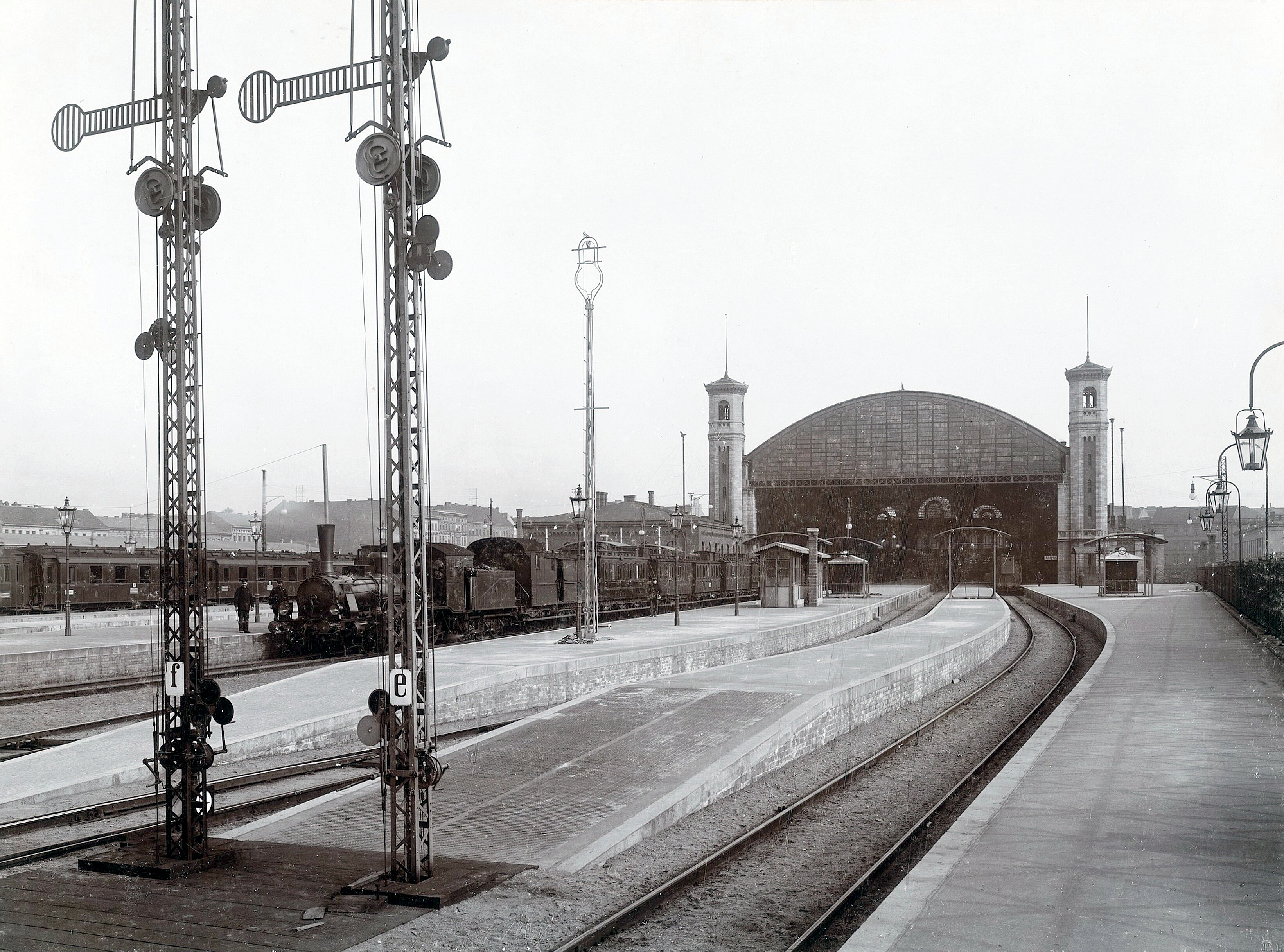 Stettiner Bahnhof, Blick auf die Haupthalle vom äußeren Linksbahnsteig